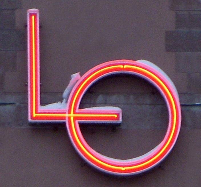 Neonskylt för LO, Stockholm